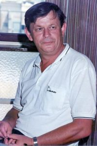 מנהל המיתולוגי קלמן צהר